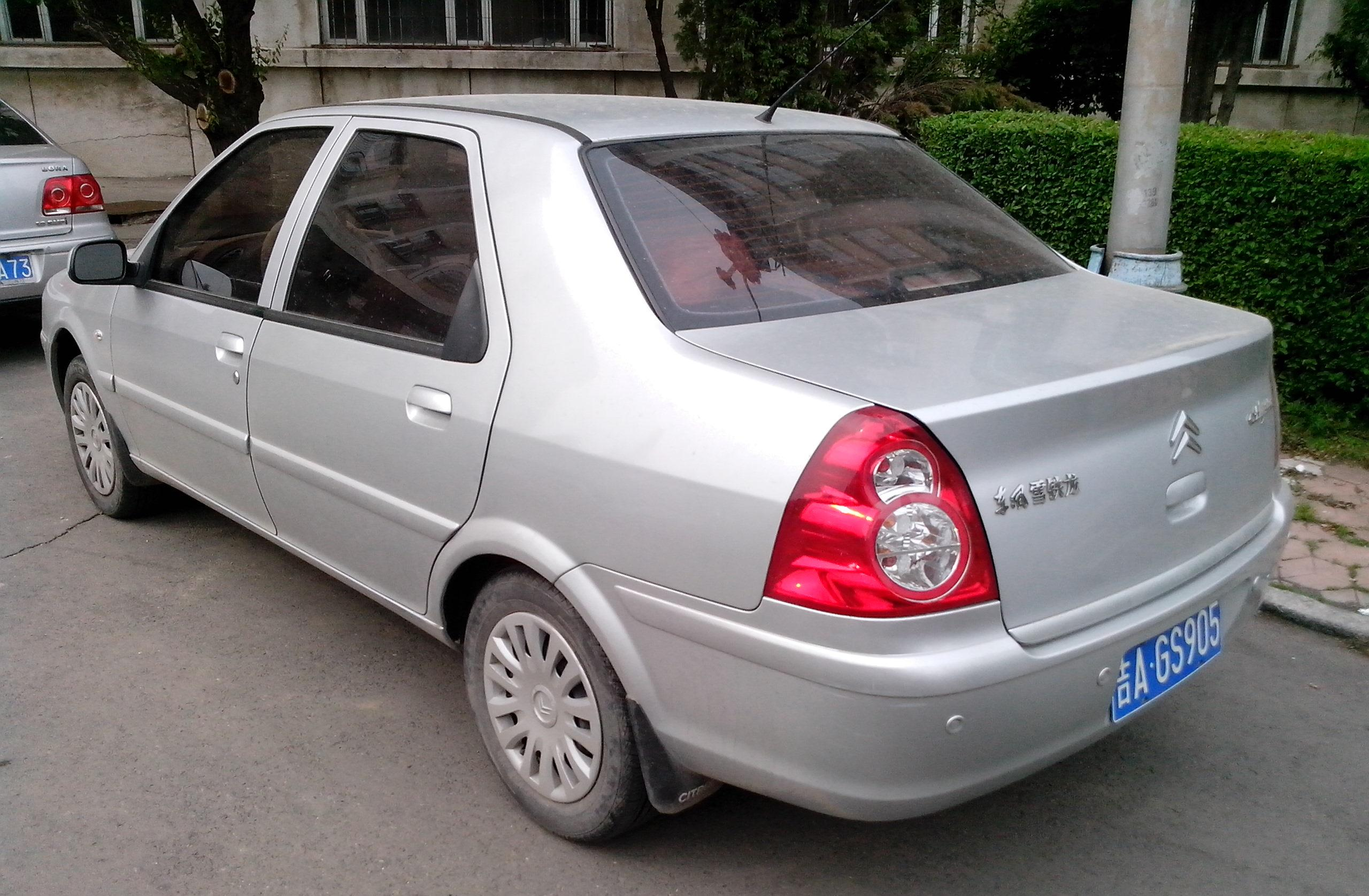 中文（中国大陆）: 东风标致雪铁龙C-爱丽舍